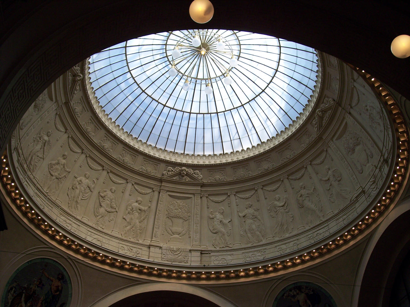 Kuppel im Foyer des Kurhauses zu Wiesbaden, Nassau, fotografiert von Autor Chalco am 23. April 2005.